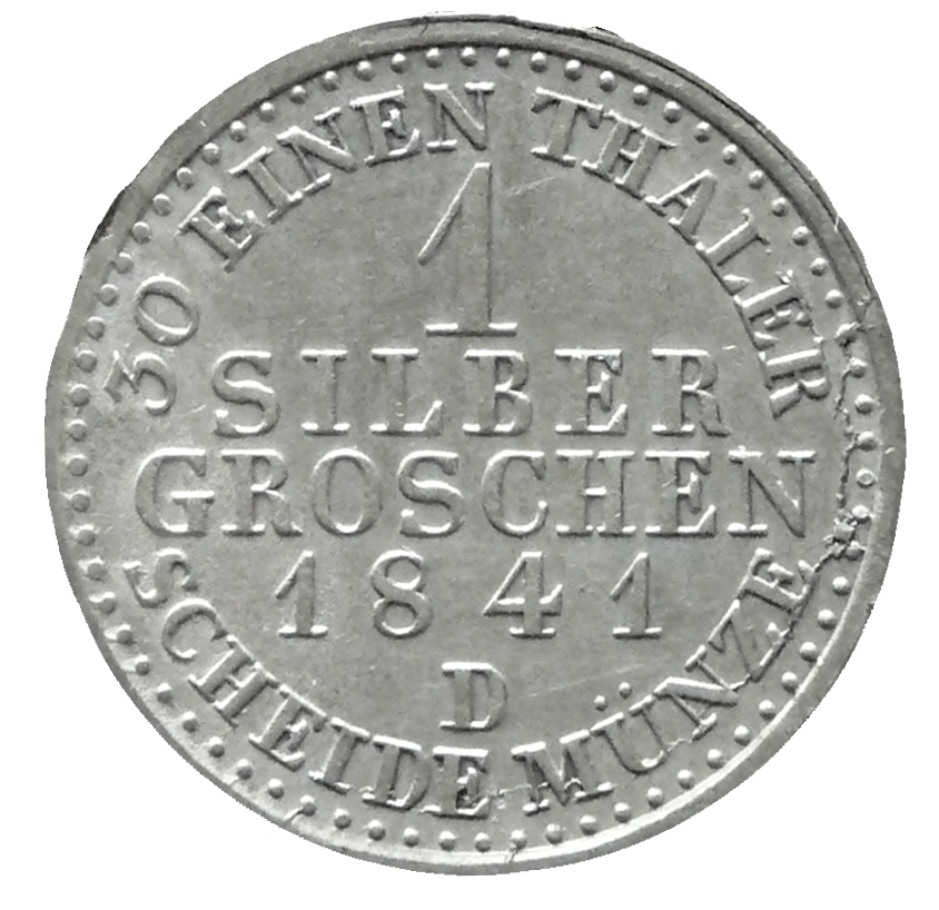 1 Silbergroschen 1841 Revers Königreich Preußen